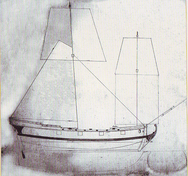 Swedish brigantine “Ulrica” from Dorpat squadron during the Great Northern war 1700-1721, probably around 1704